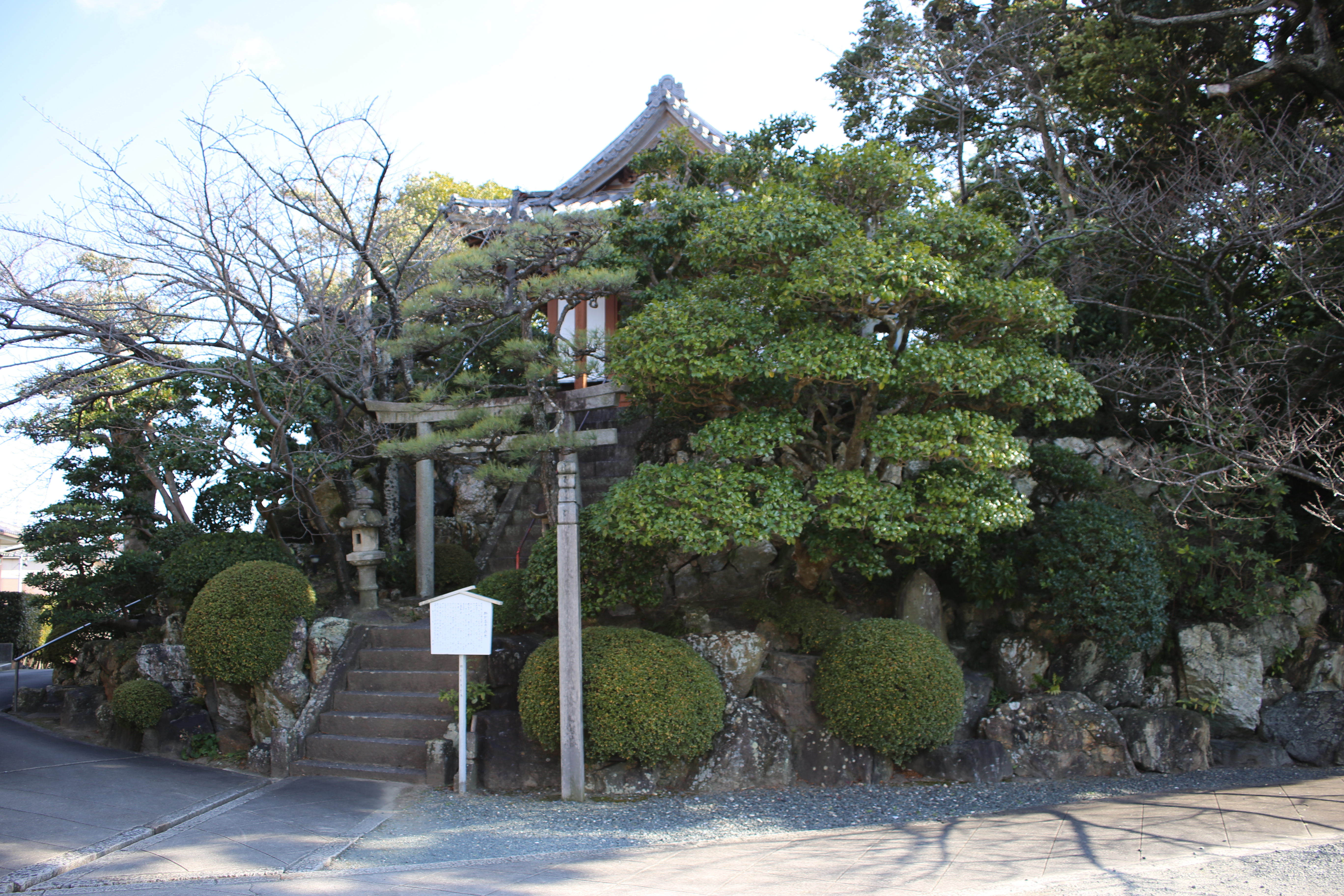 愛知県田原市田原町の城宝寺古墳の全体像